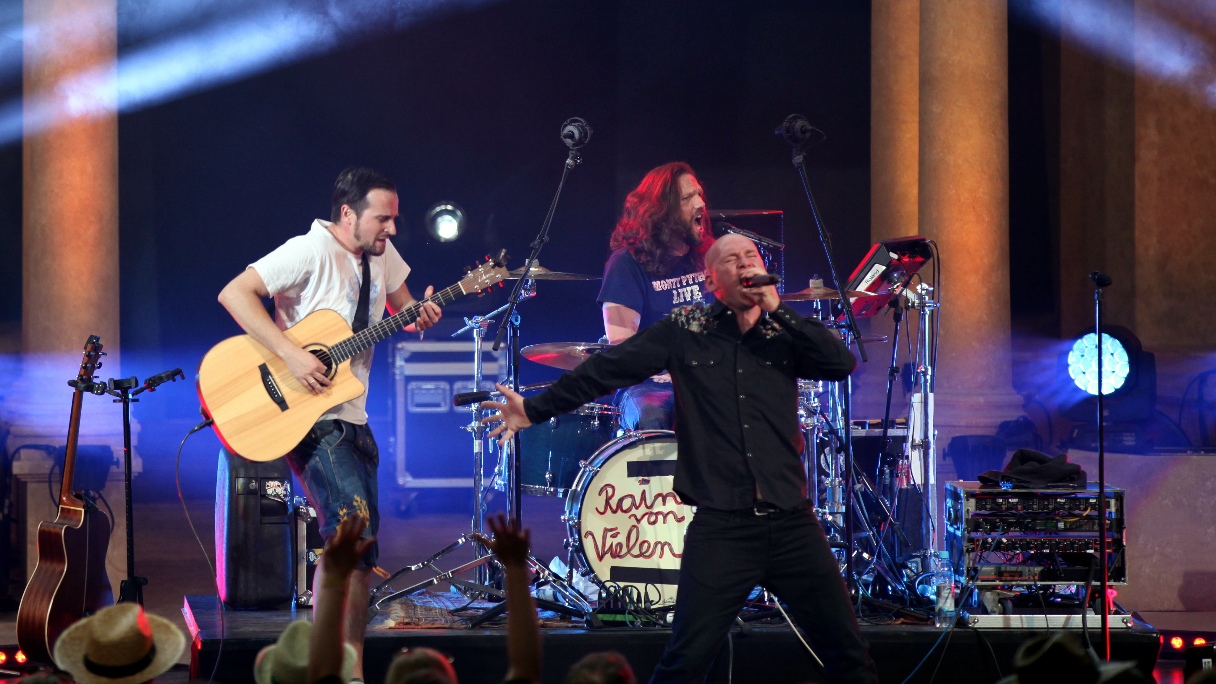 Rainer von Vielen mit Band auf dem Heimatsoundfestival 2015 in Oberammergau. Gesang, Akkordeon, Gitarre: Rainer von Vielen (Rainer Hartmann) Gitarre: Mitsch Oki (Michael Schönmetzer) Bassgitarre: Dan Le Tard (Daniel Schubert) Schlagzeug: Sebastian Schwab